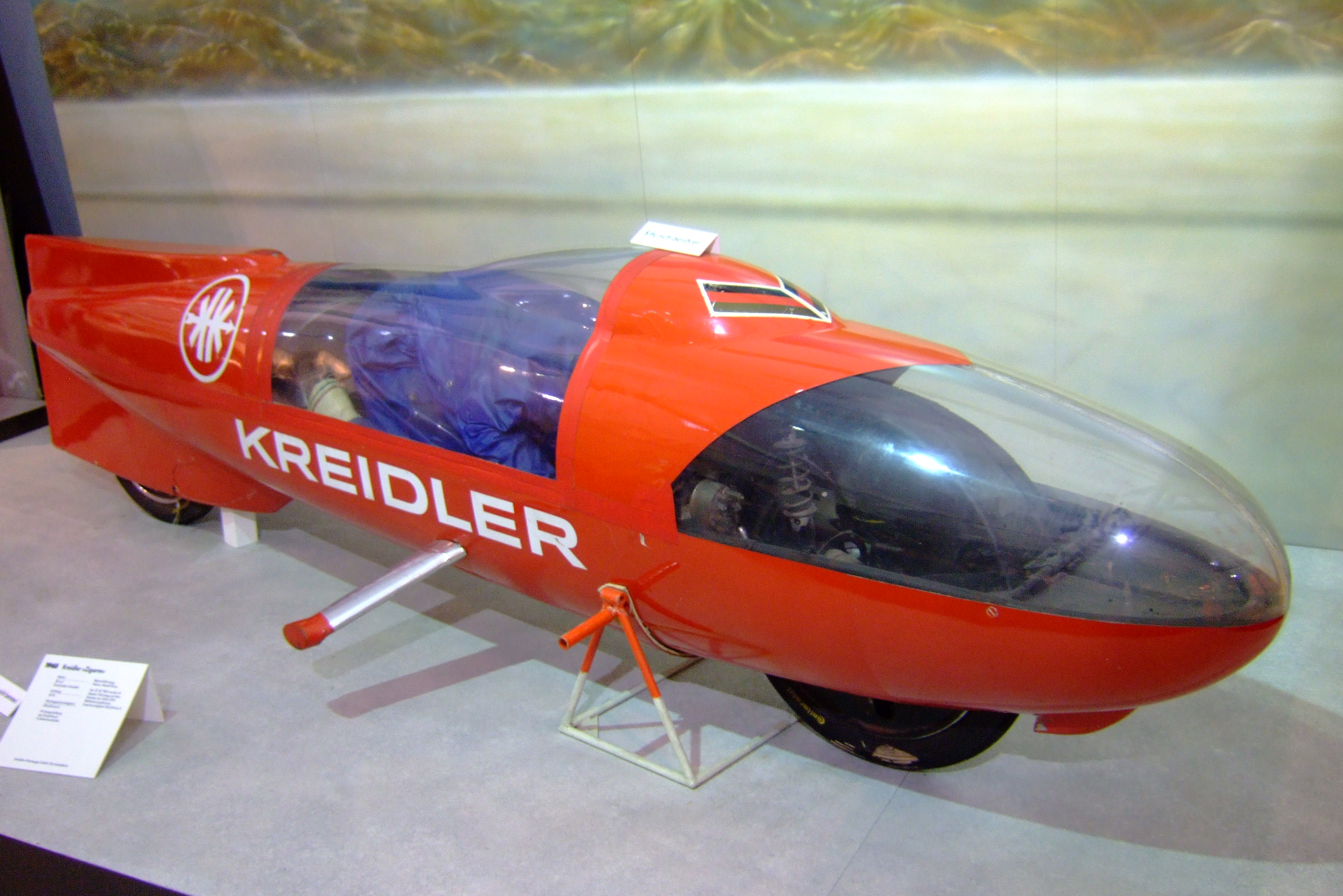 Motorbike "Kreidler Zigarre" (1965) at the Deutsches Zweirad- und NSU-Museum (50 cm³, record: 210,634 km/h 23.10.1965 Utah/USA)